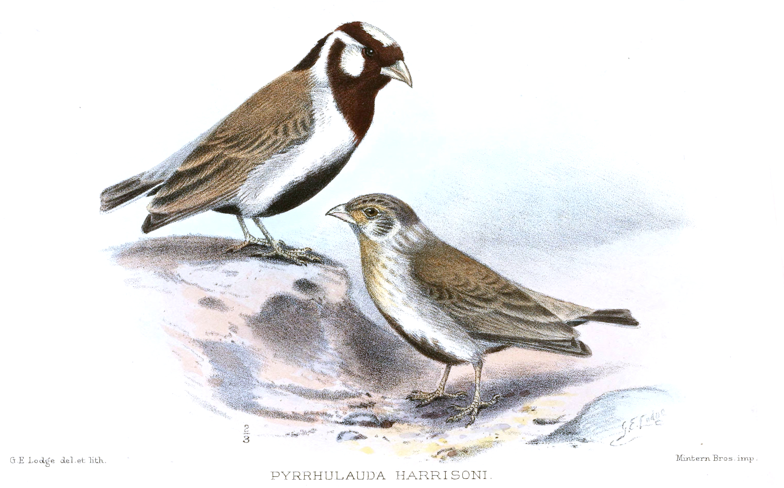 Pyrrhulauda harrisoni = Eremopterix signata harrisoni